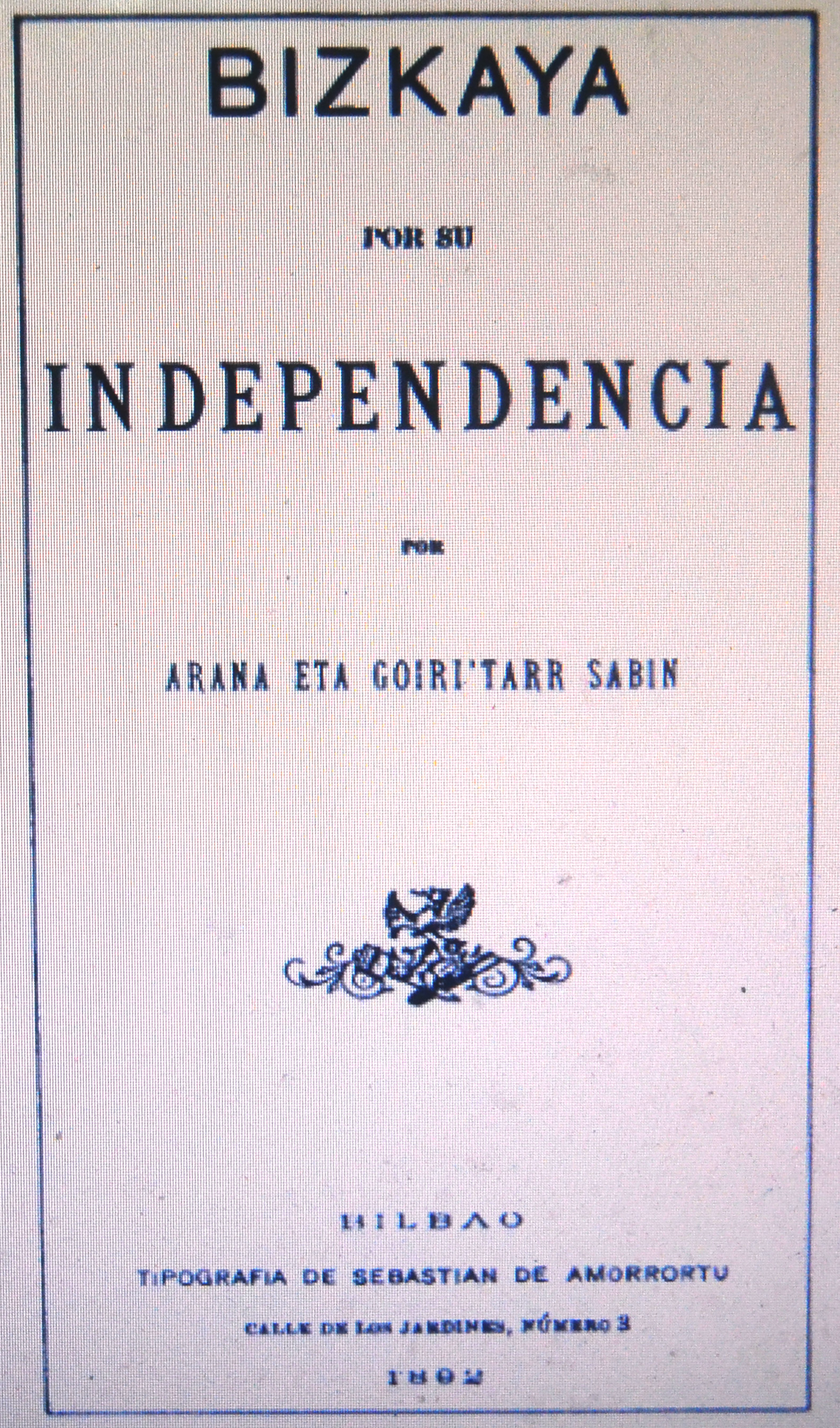 Bizkaia bere independentziaren alde (Sabin Arana Goiri, 1892) - Biscay for its independence (Sabino Arana Goiri, 1892)